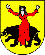 Herb wsi i gminy Sawin.